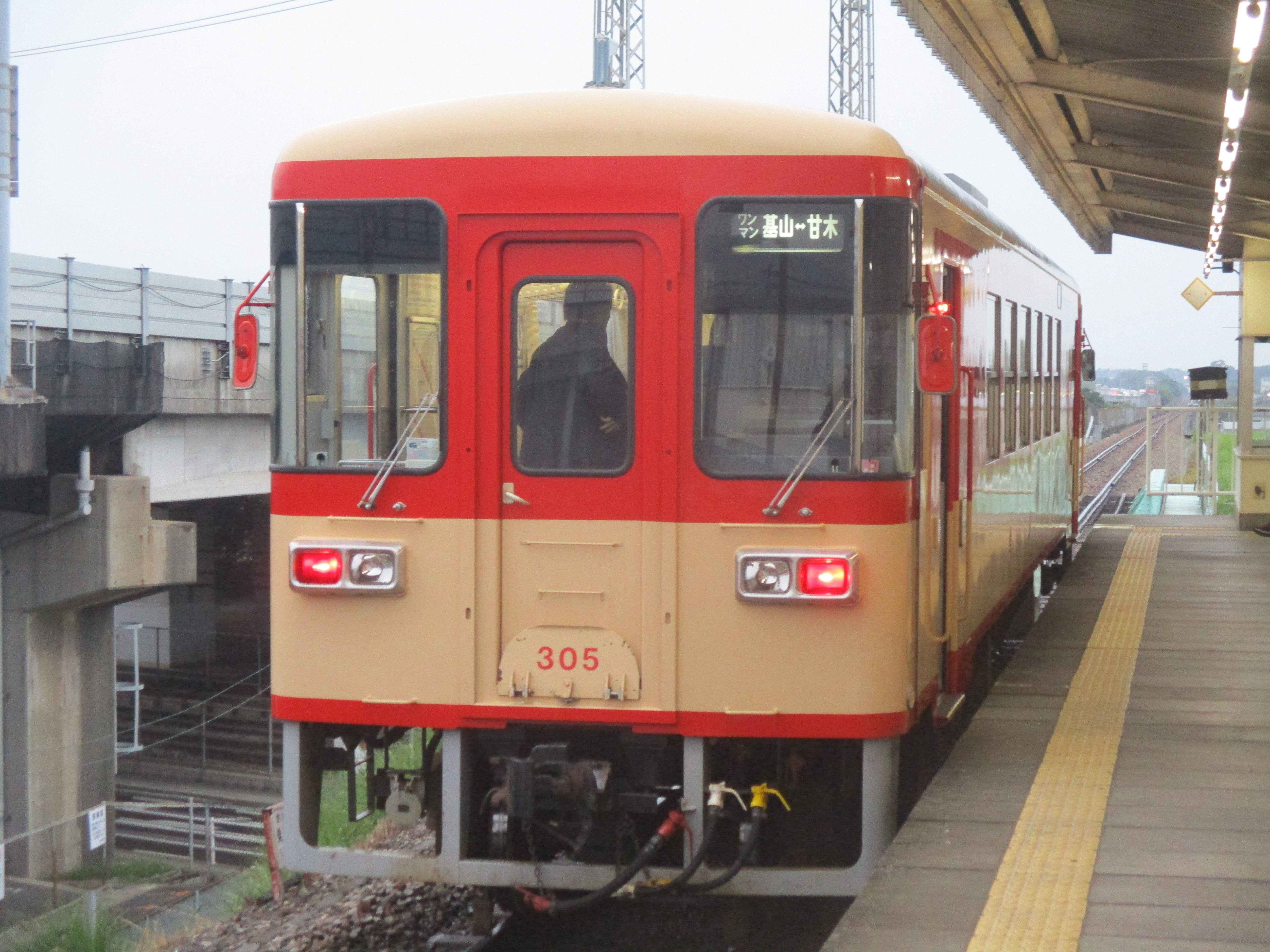 甘木鉄道小郡駅に停車中のAR305（2018年9月）